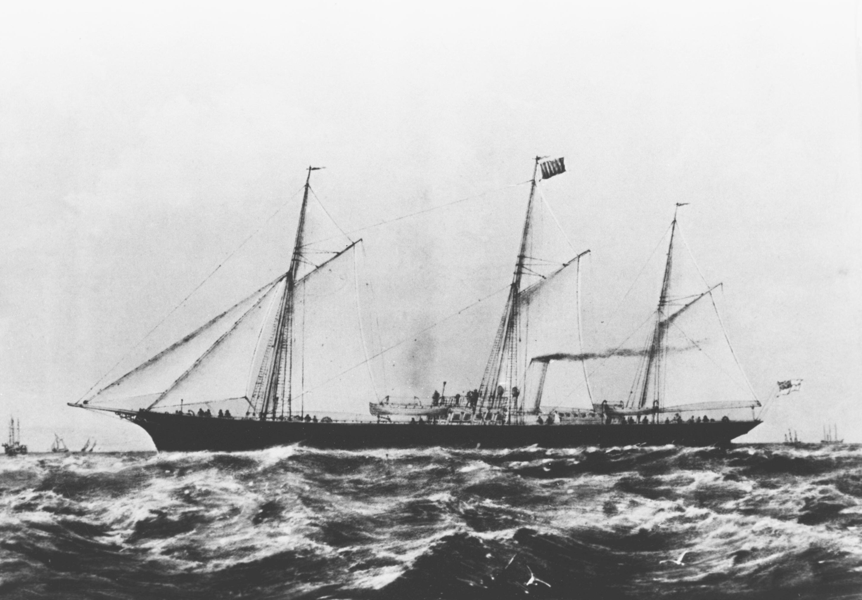 האוניה סטרומה בהיותה יאכטה, ובטרם היותה אוניית העפלה